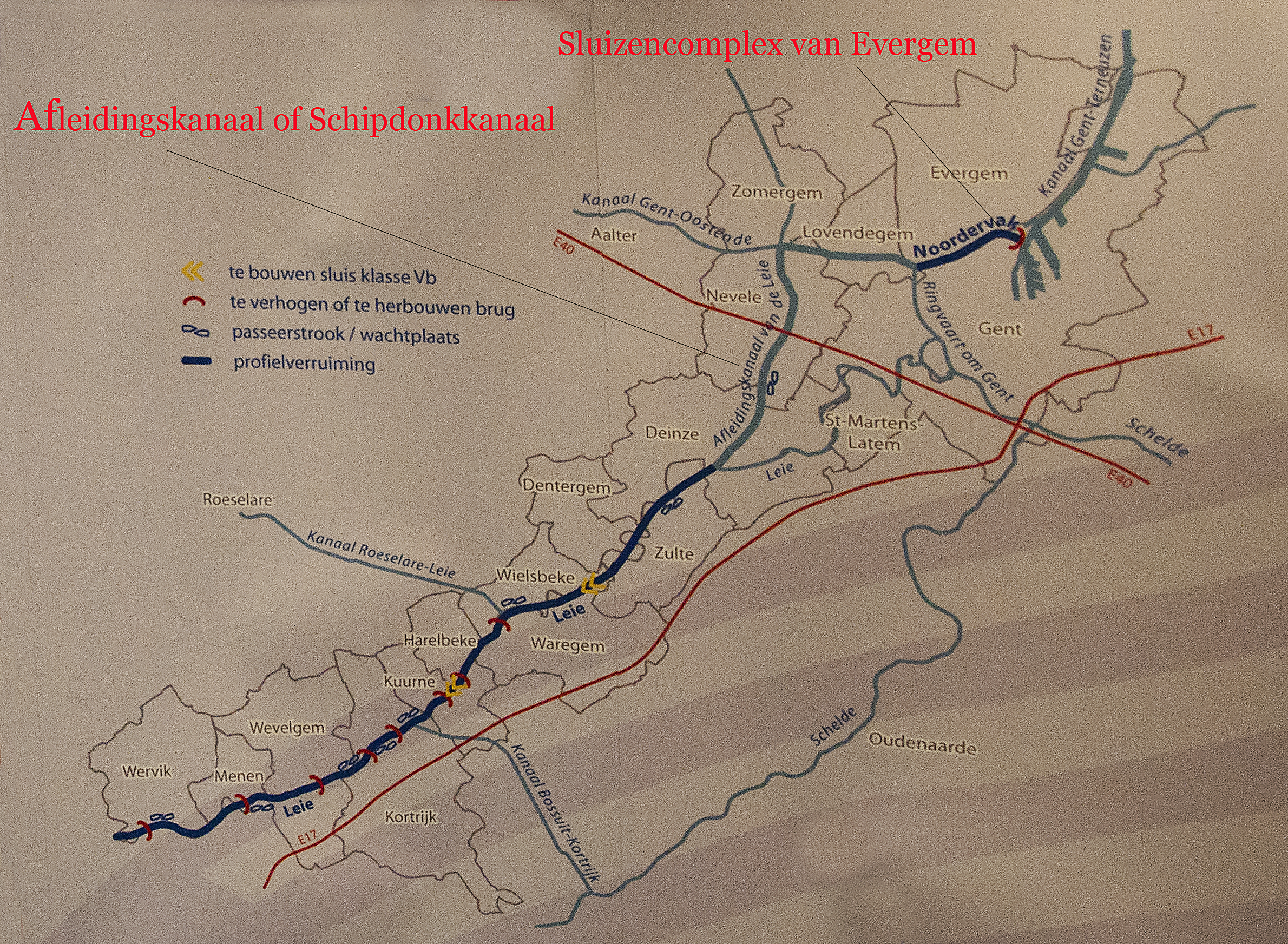 Foto van kaart gemaakt door Waterwegen en Zeekanaal NV van het project Seine-Schelde, aangepast door de oplader van de foto